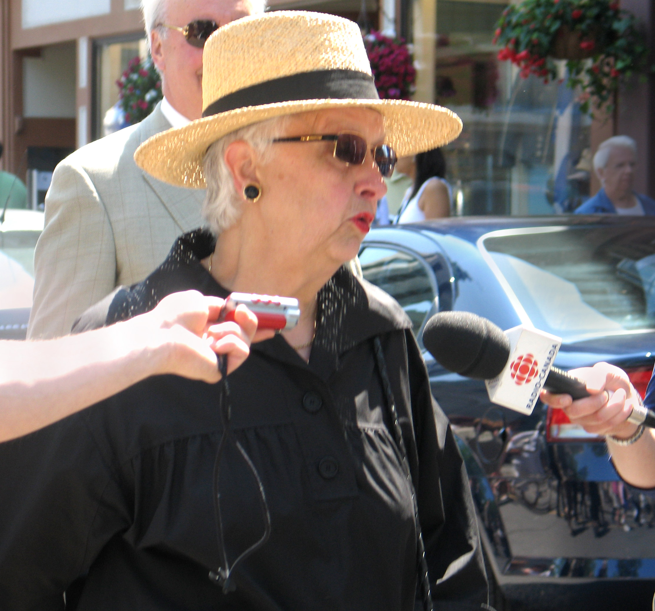 La maire de Québec (2005 -2007), Andrée P. Boucher. Photo: Claude Boucher